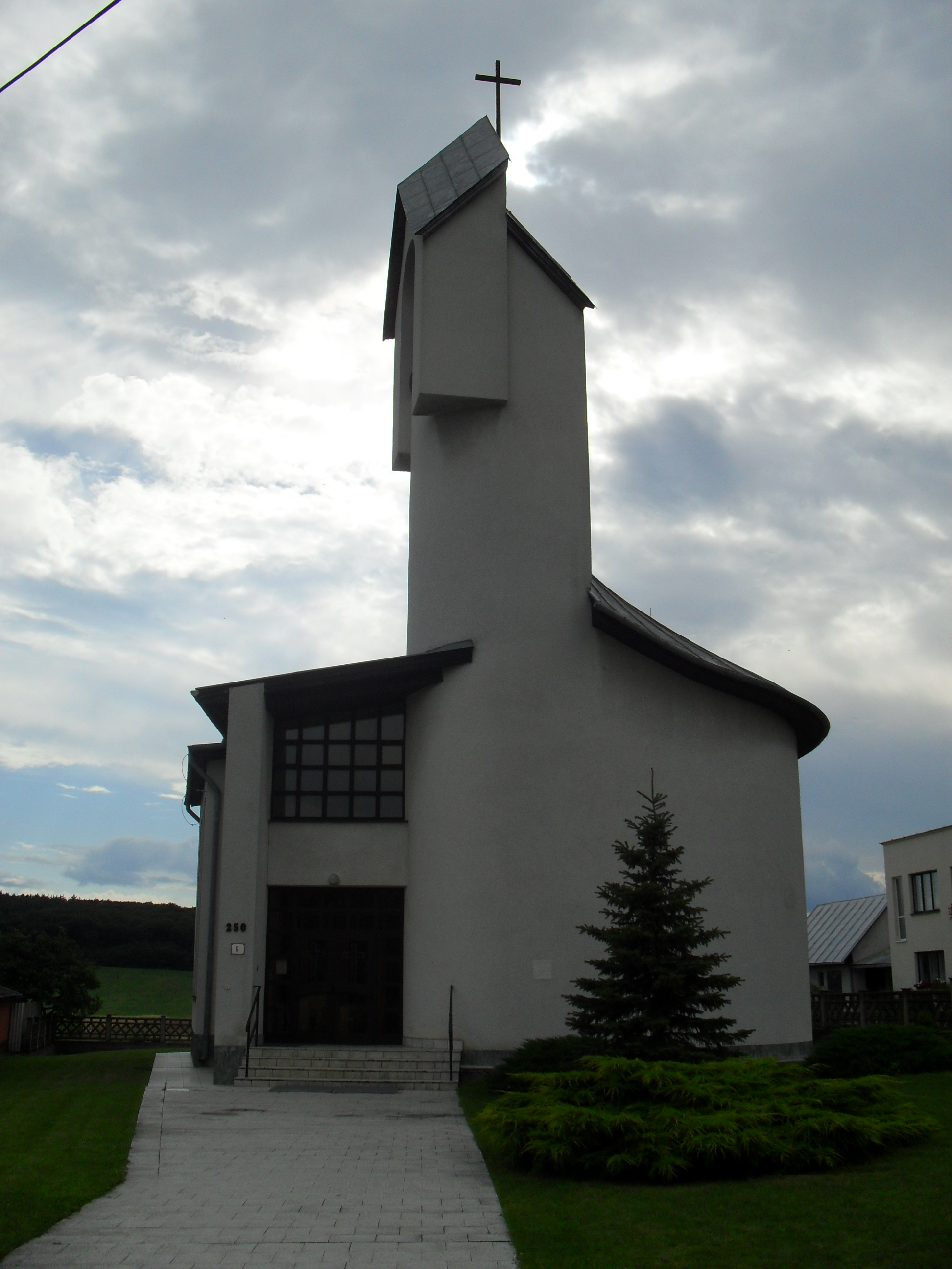 Nagytoronya - római katolikus templom